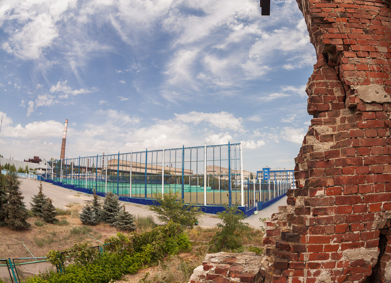 Учебно-тренировочная база «Ротор». Вид из руинов командного пункта 138-й стрелковой дивизии.